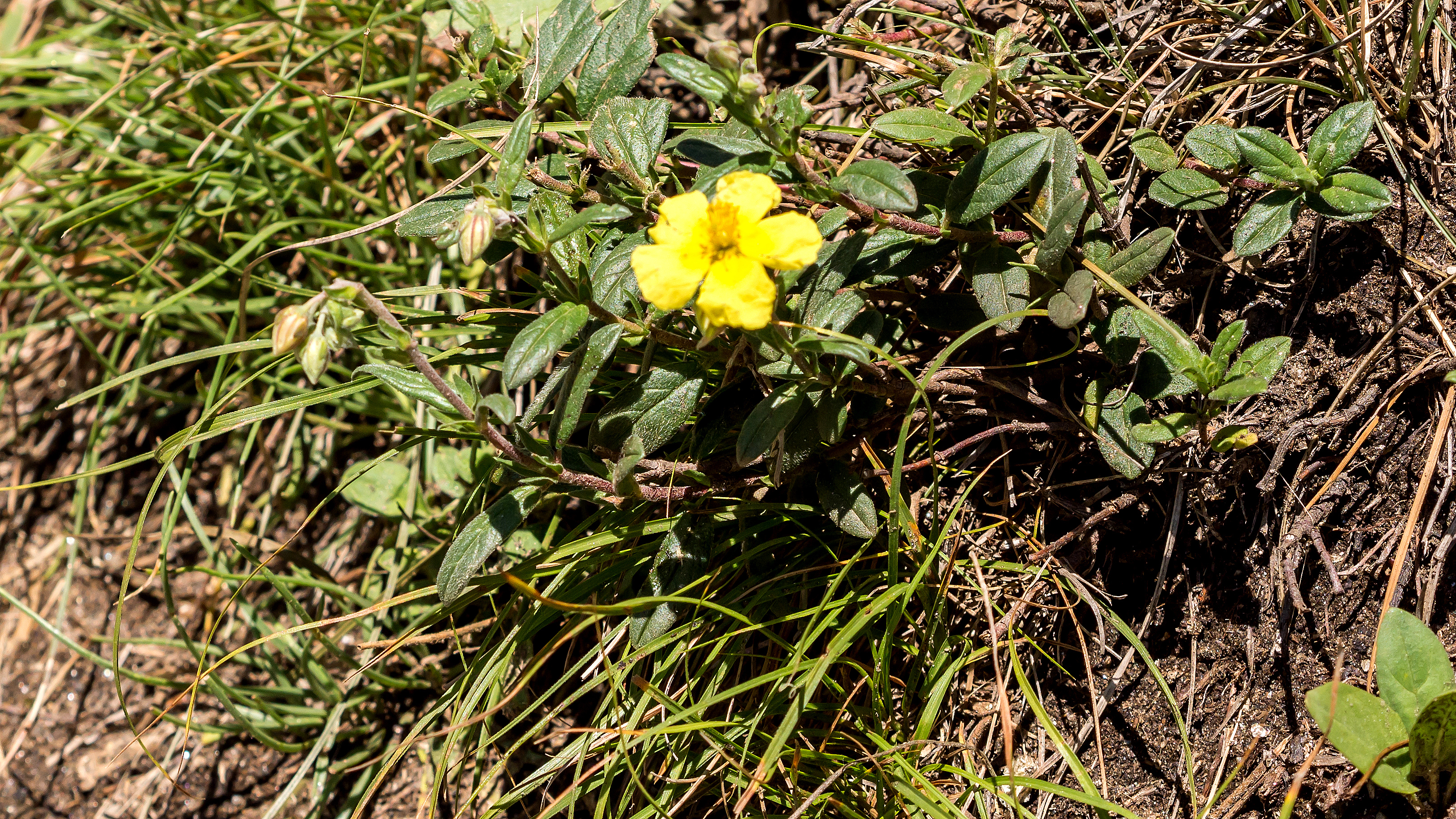 Meraner Höhenweg II